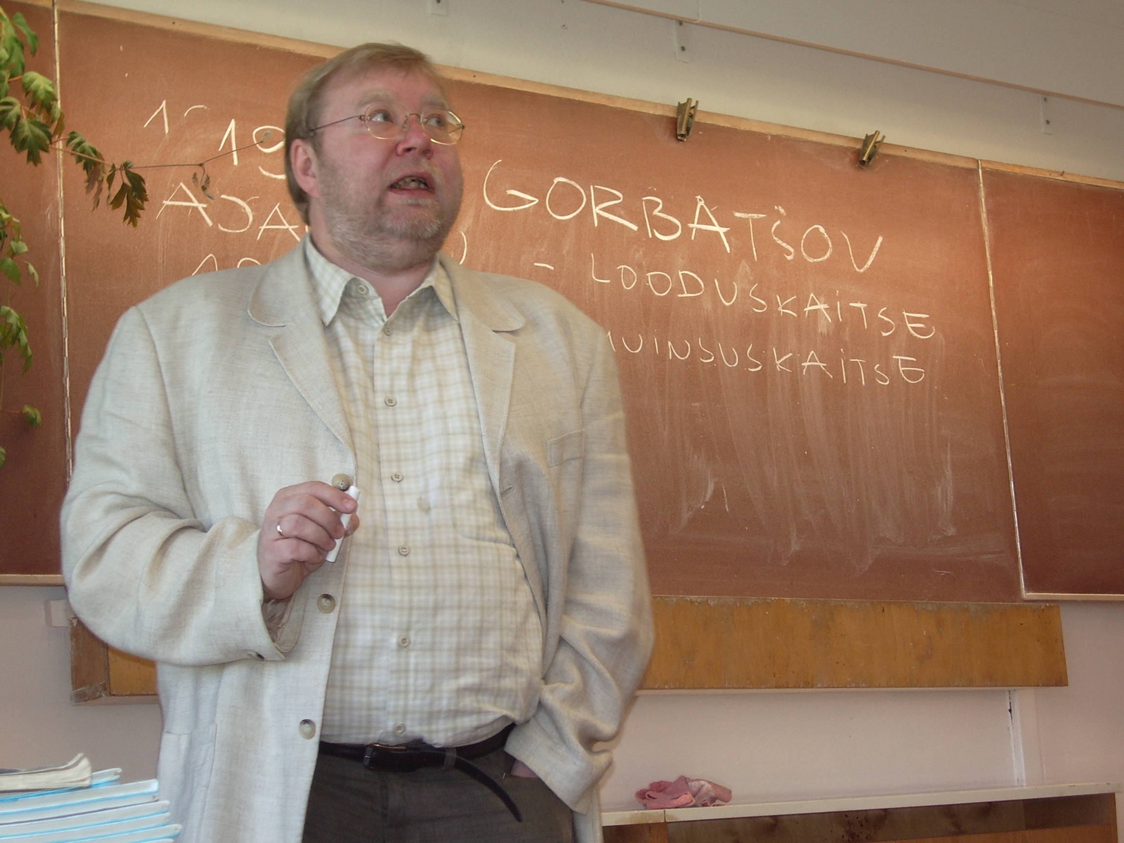 Mart Laar at Valjala basic school